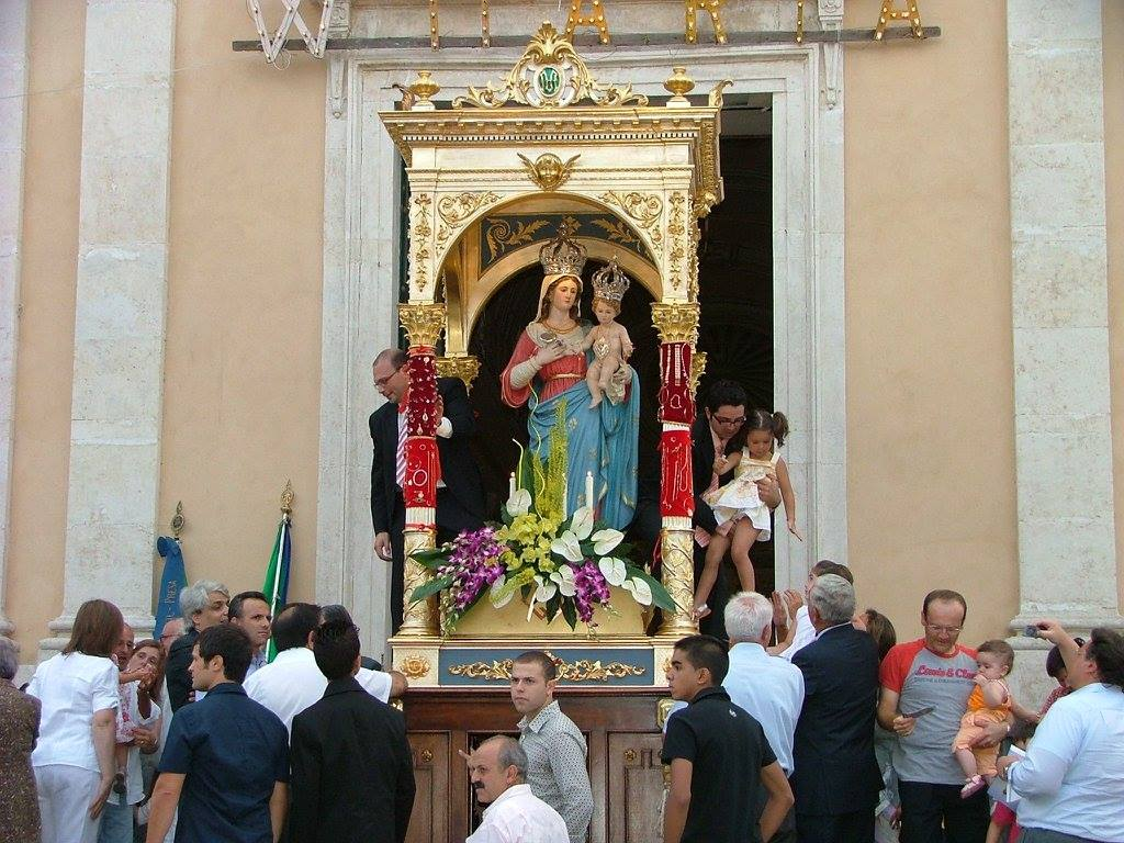 Il simulacro della Madonna, dopo esser stato traslato sul fercolo, esce dalla Chiesa per la processione.